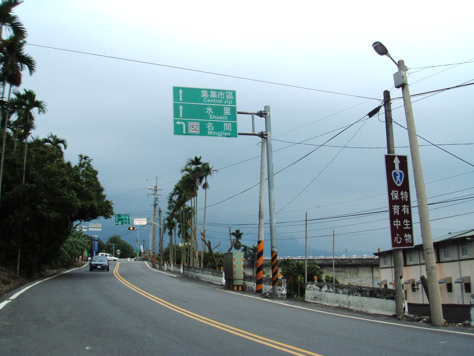 中文（台灣）: 南投縣集集鎮臺3丙線終點。